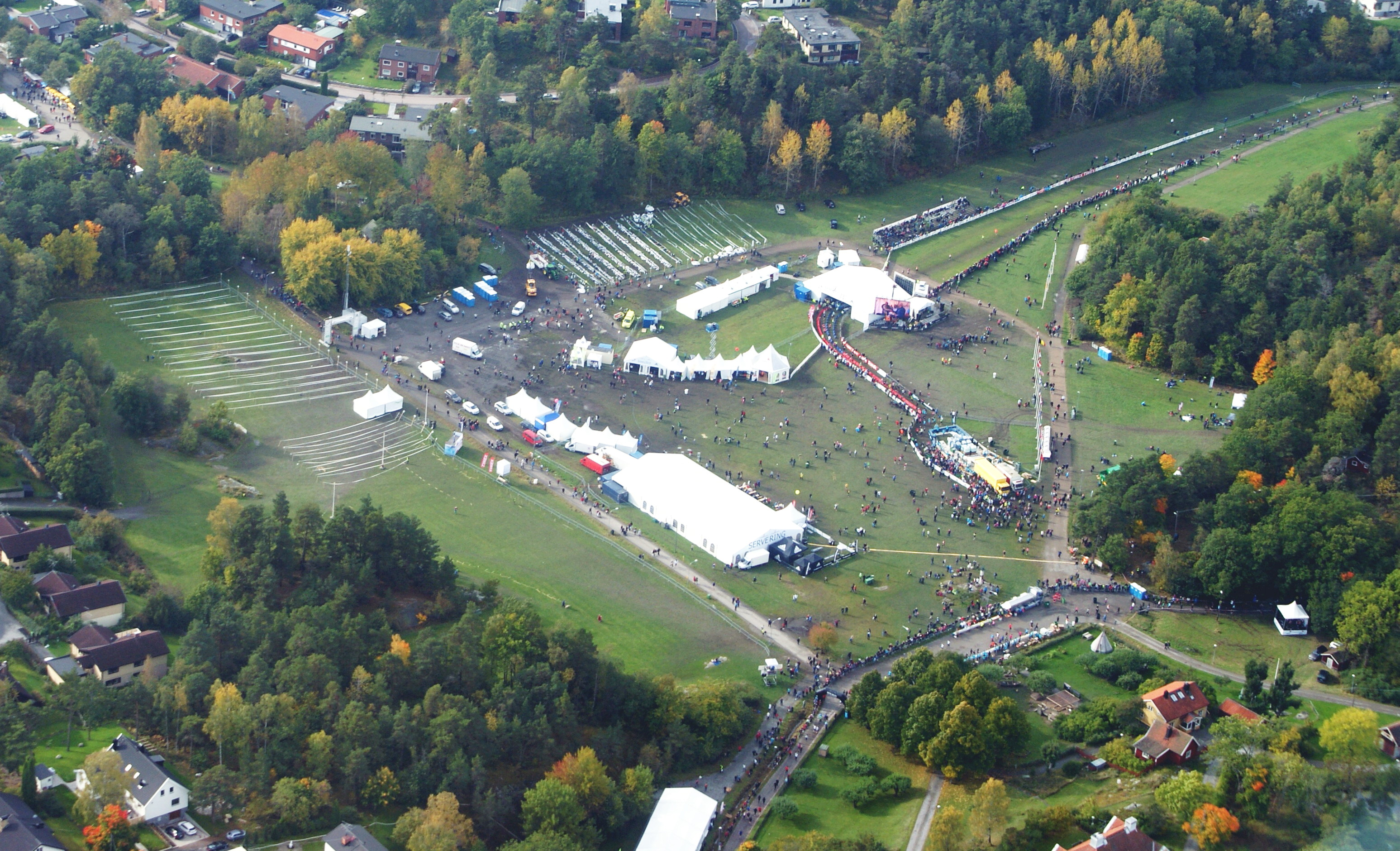 Lidingöloppet 2012 sedd från helikopter.